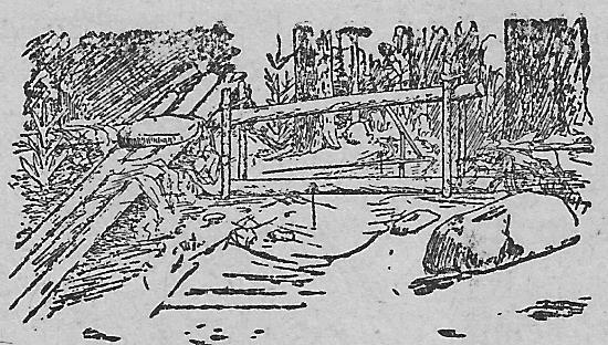 Pienten eläinten pyydystämiseen tarkoitettu ansa